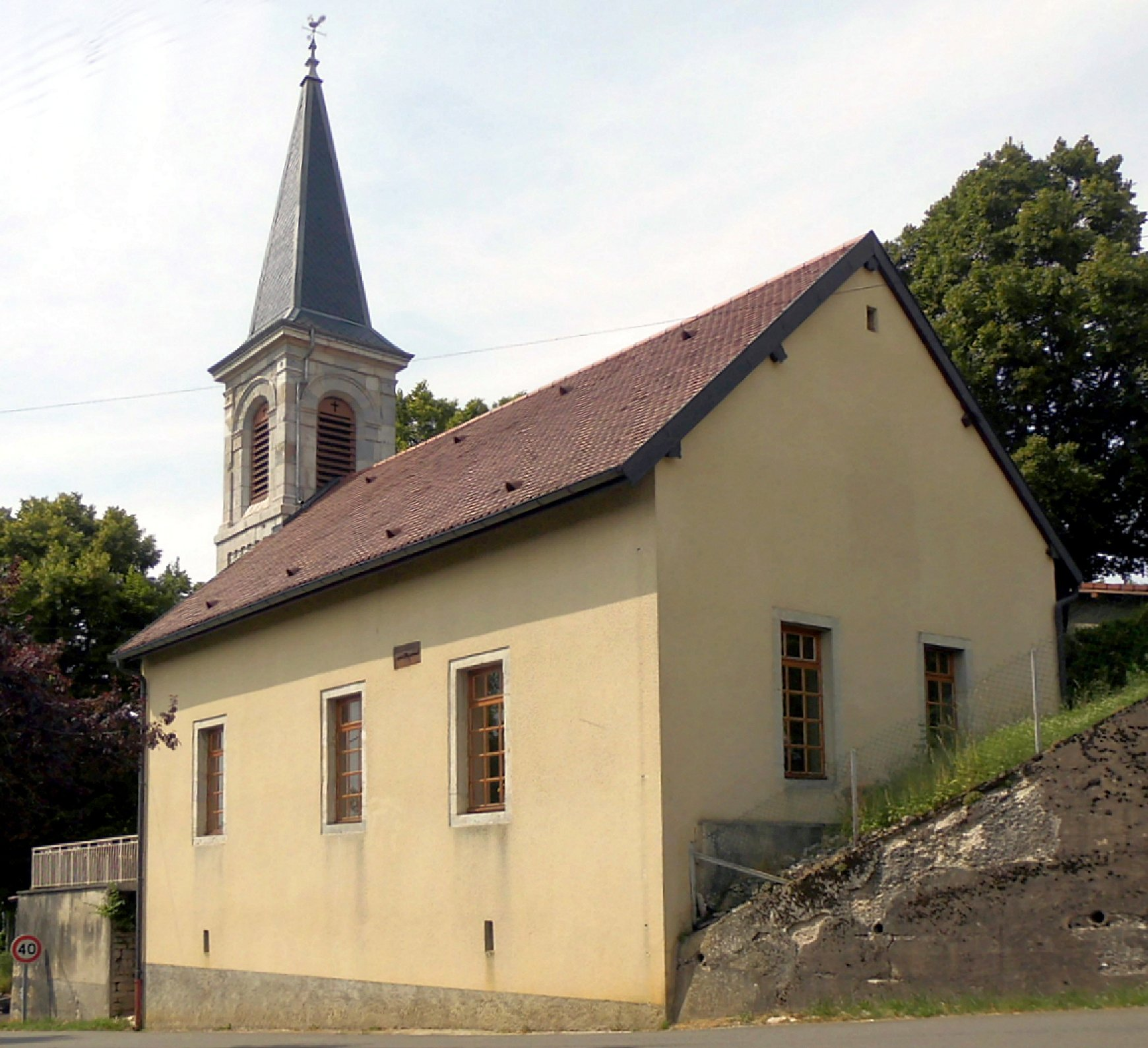 L'église luthérienne d'Écurcey